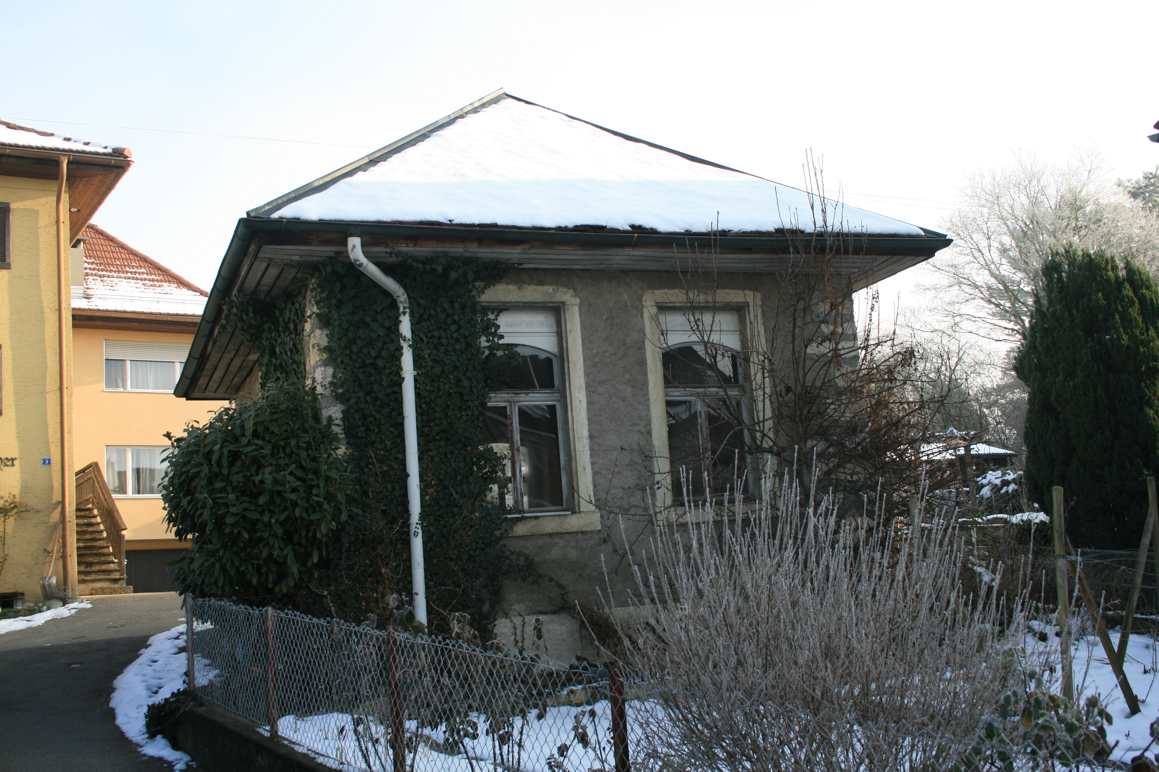 Lengnau AG